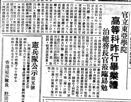 中文（香港）: 摘自《香港日報》中文版1944年7月21日。該報社結束已逾50年，因此無版權問題。